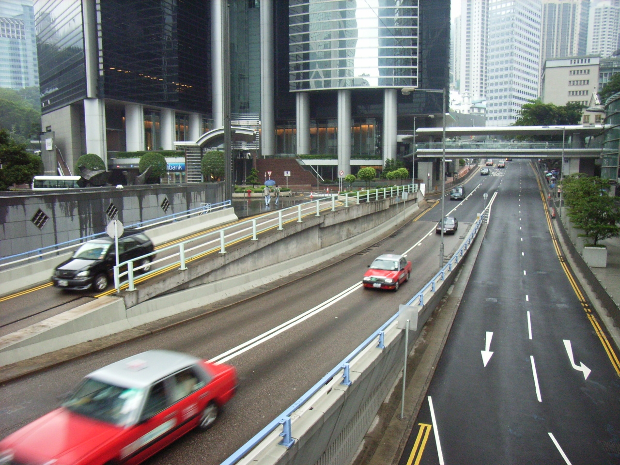 花園道天橋上金鐘道 AlbertCotton